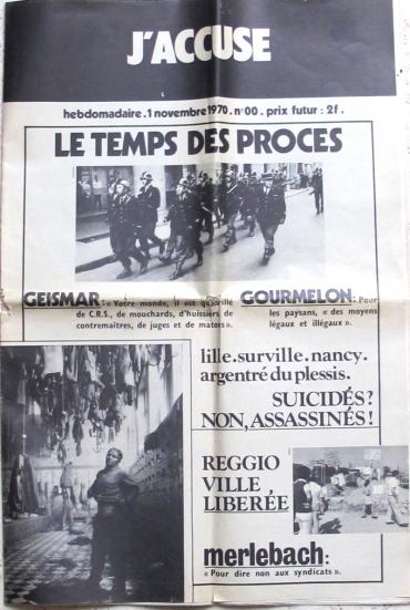 Le journal J'Accuse édité par la Gauche prolétarienne n°00 du 1er novembre 1970